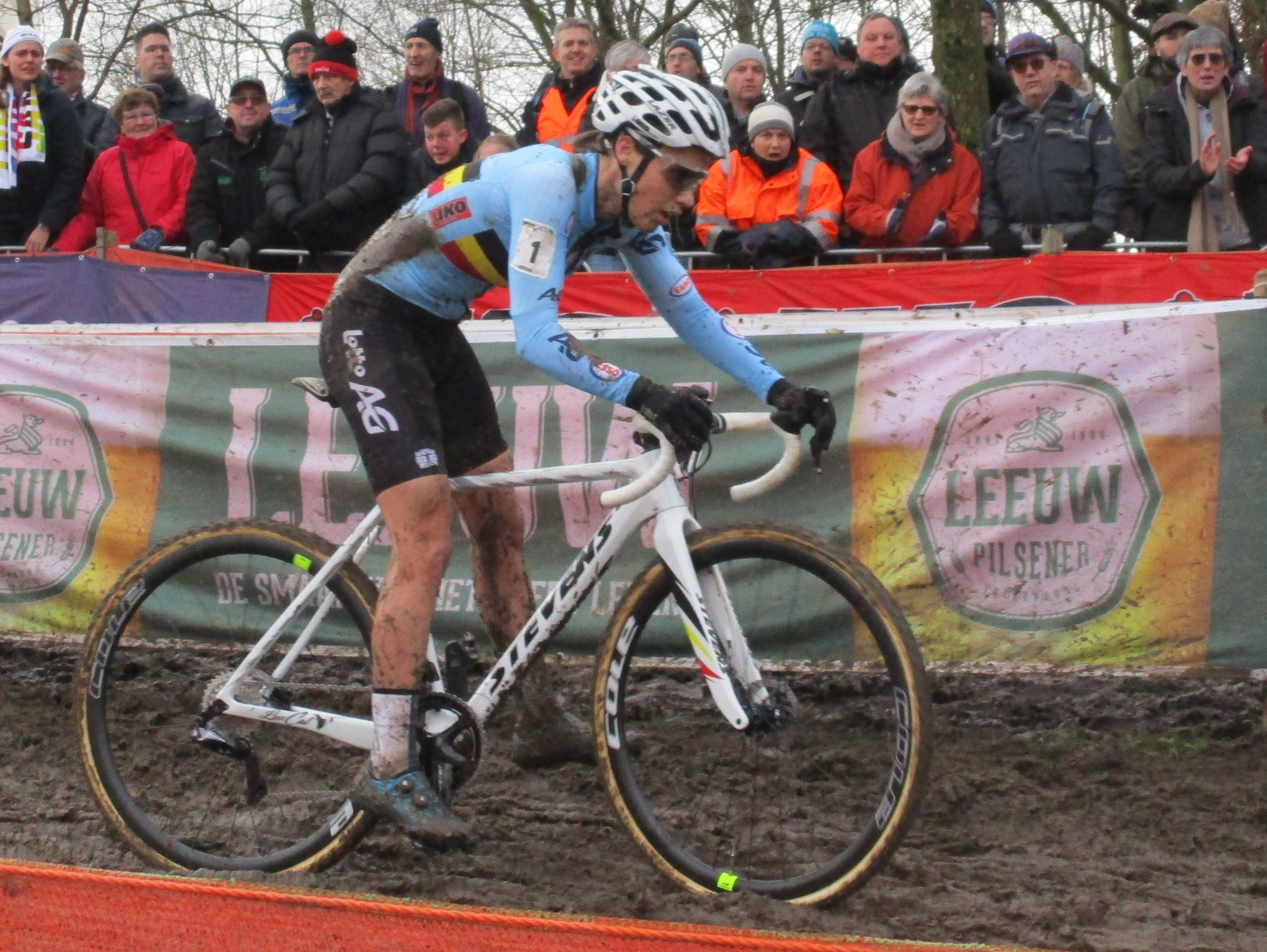 Wereldkampioenschappen Veldrijden op 3 en 4 februari 2018 op de Cauberg in Valkenburg, Limburg, Nederland. Wedstrijd van de vrouwen elite. Ronde 4 van 4.